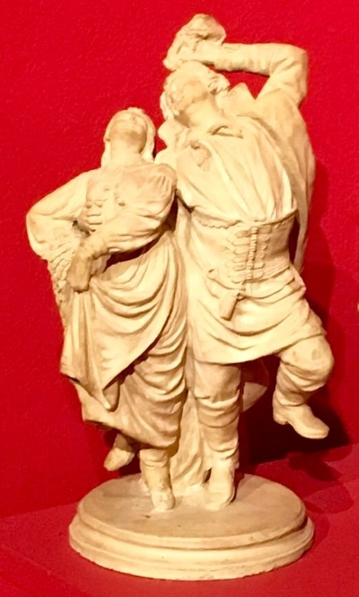 Oberek - rzeźba Antoniego Kurzawy, 1881